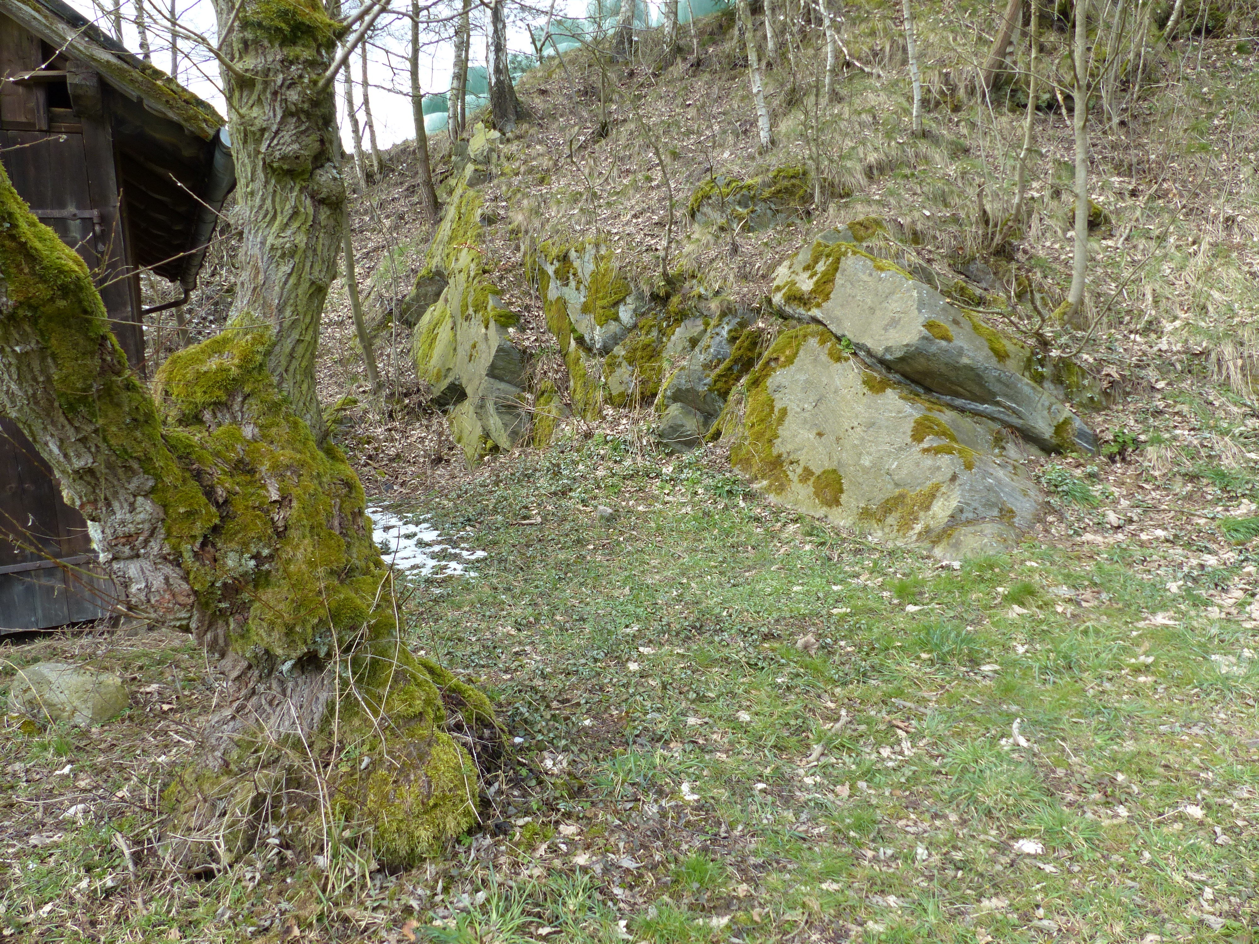 Ehemaliger Steinbruch, heute Geotop